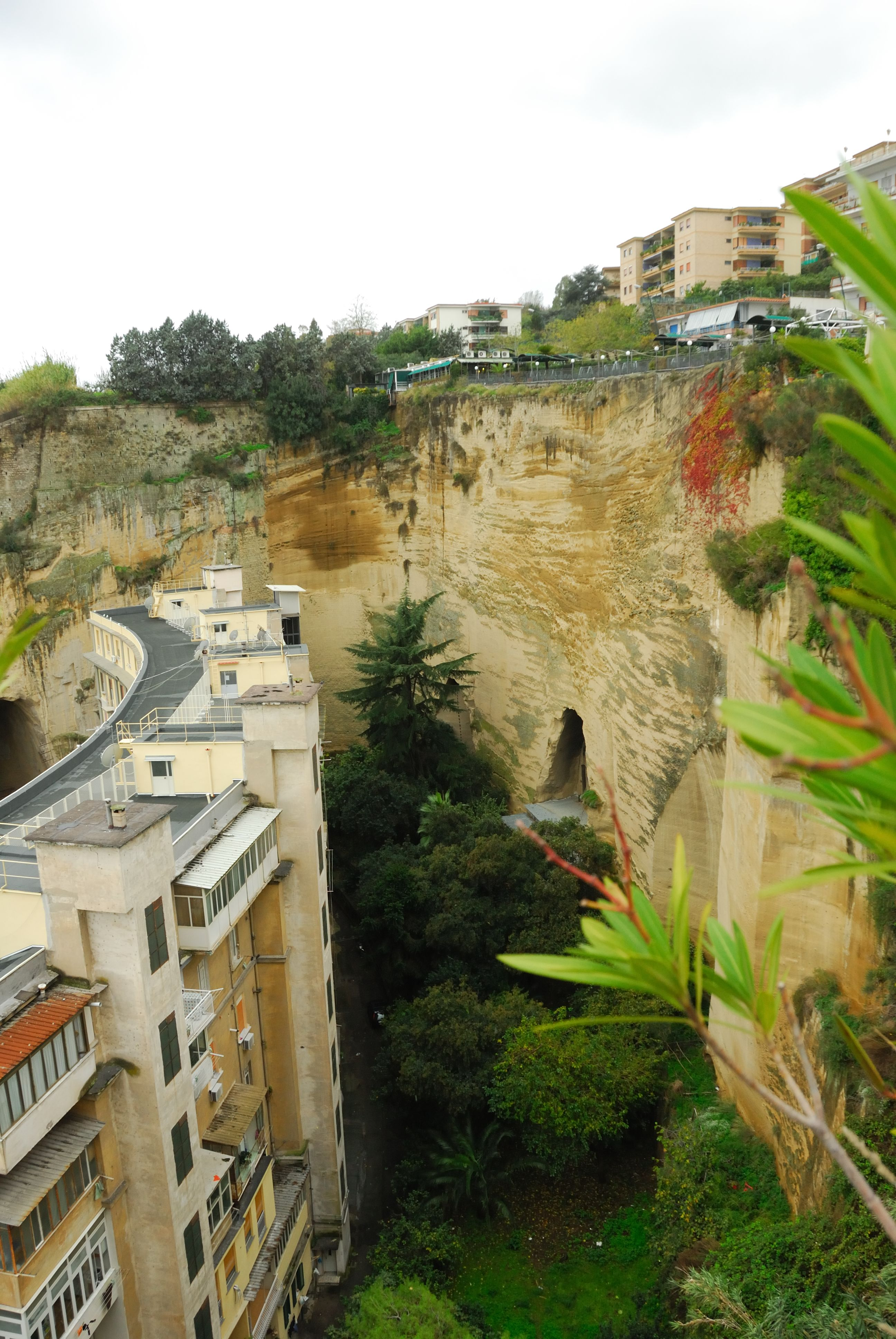 Field trip to Campi Flegrei - Piazza San Luigi viewed from via Petrarca (Naples).